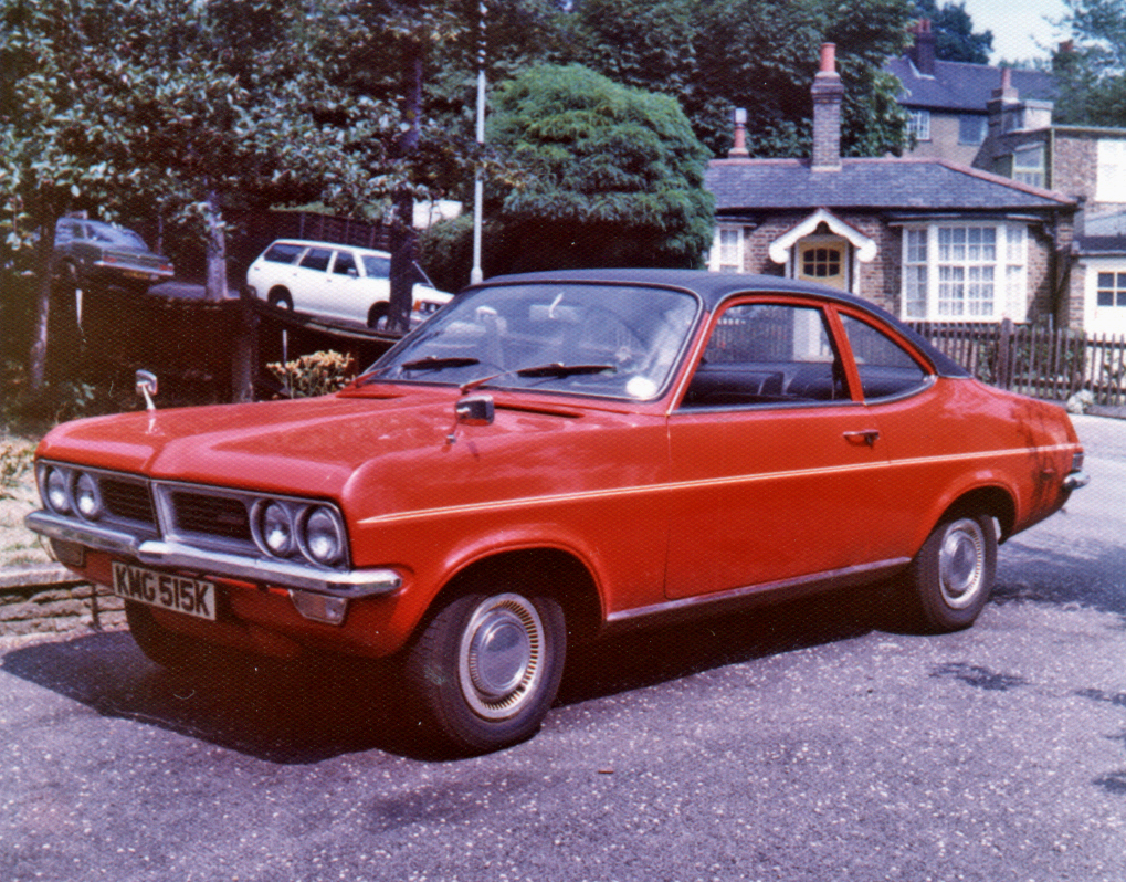 Vauxhall Firenza SL2000 Automatic.